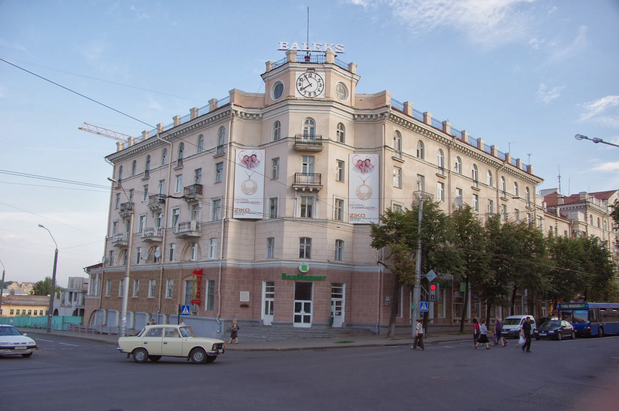 Lieninski District, Mogilev, Belarus